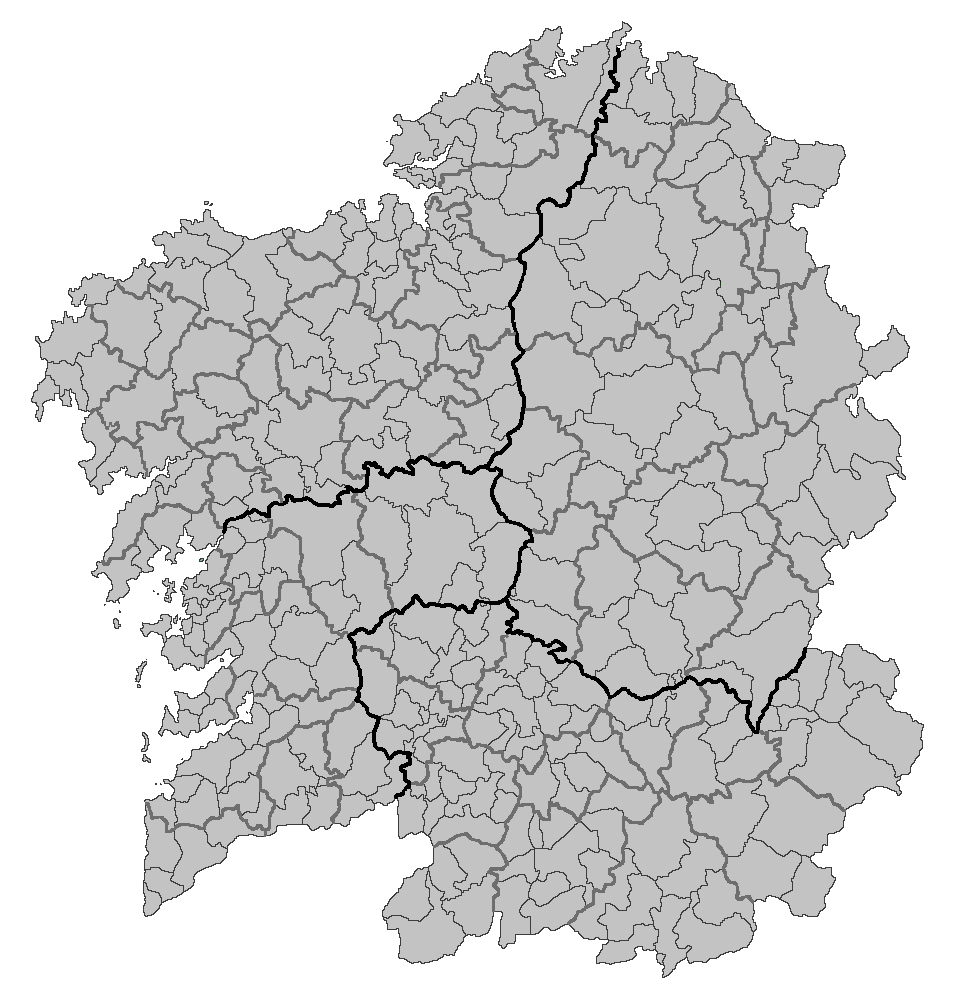 Comarcas galegas con concellos